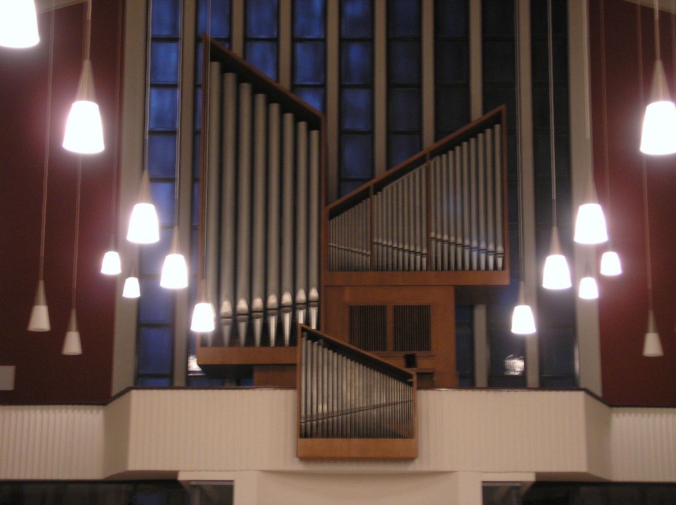 Prospekt der Alfred-Führer-Orgel in St. Marien, Bremen-Walle